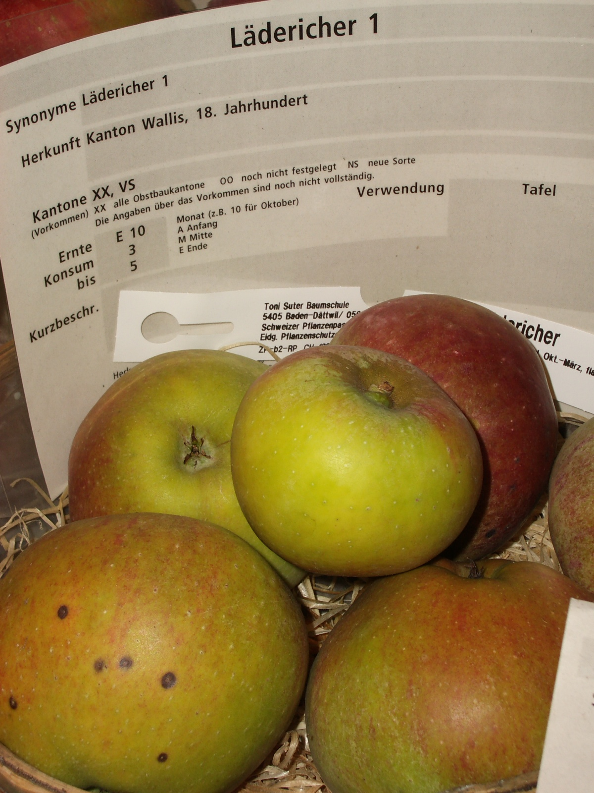 Malus Lädericher 1, Münzlishausen AG self-made, October 2005